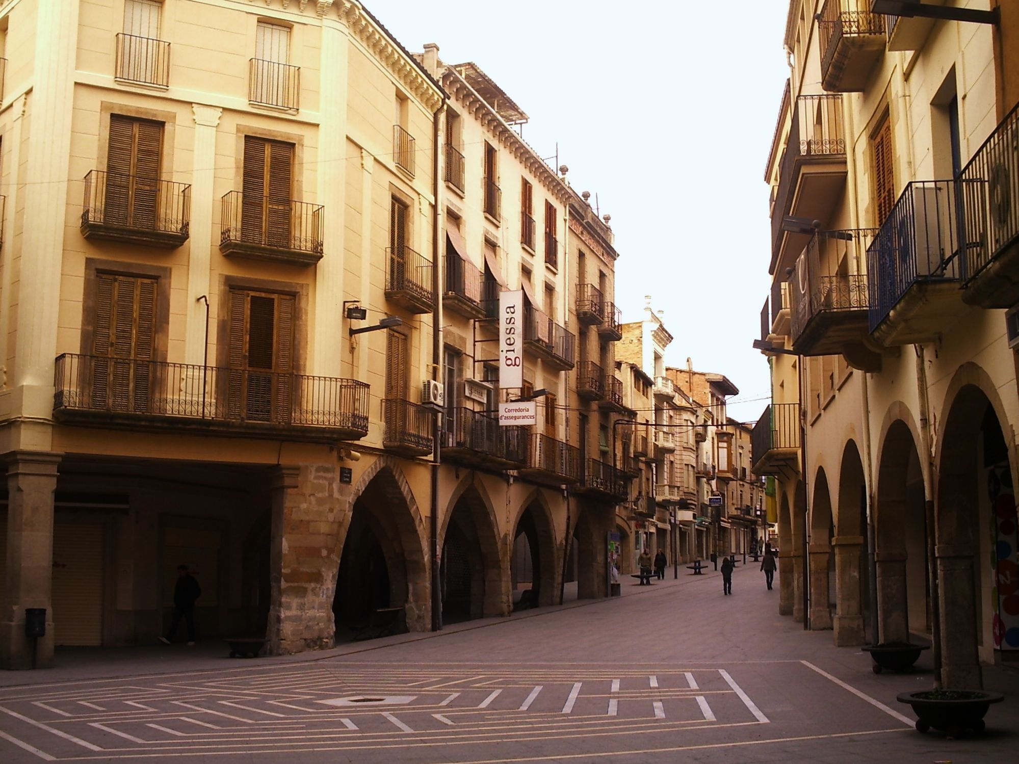 Vista dels porxos gòtics (segle XV) ubicats al Carrer del Carme, a Tàrrega